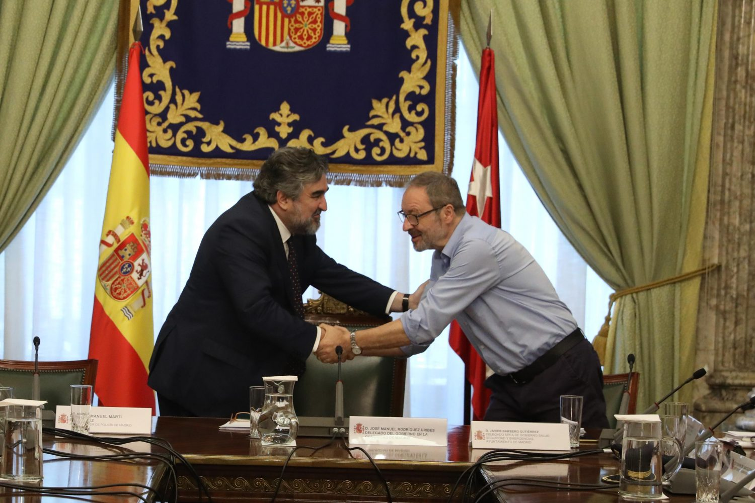 El delegado de Salud, Seguridad y Emergencias del Ayuntamiento de Madrid, Javier Barbero, se ha reunido esta mañana, lunes 2 de julio, con el delegado del Gobierno, José Manuel Rodríguez Uribes, en la Delegación de Gobierno de Madrid para preparar el dispositivo de seguridad adicional que se desplegará el próximo sábado 7 de julio con motivo de la manifestación del Orgullo 2018.